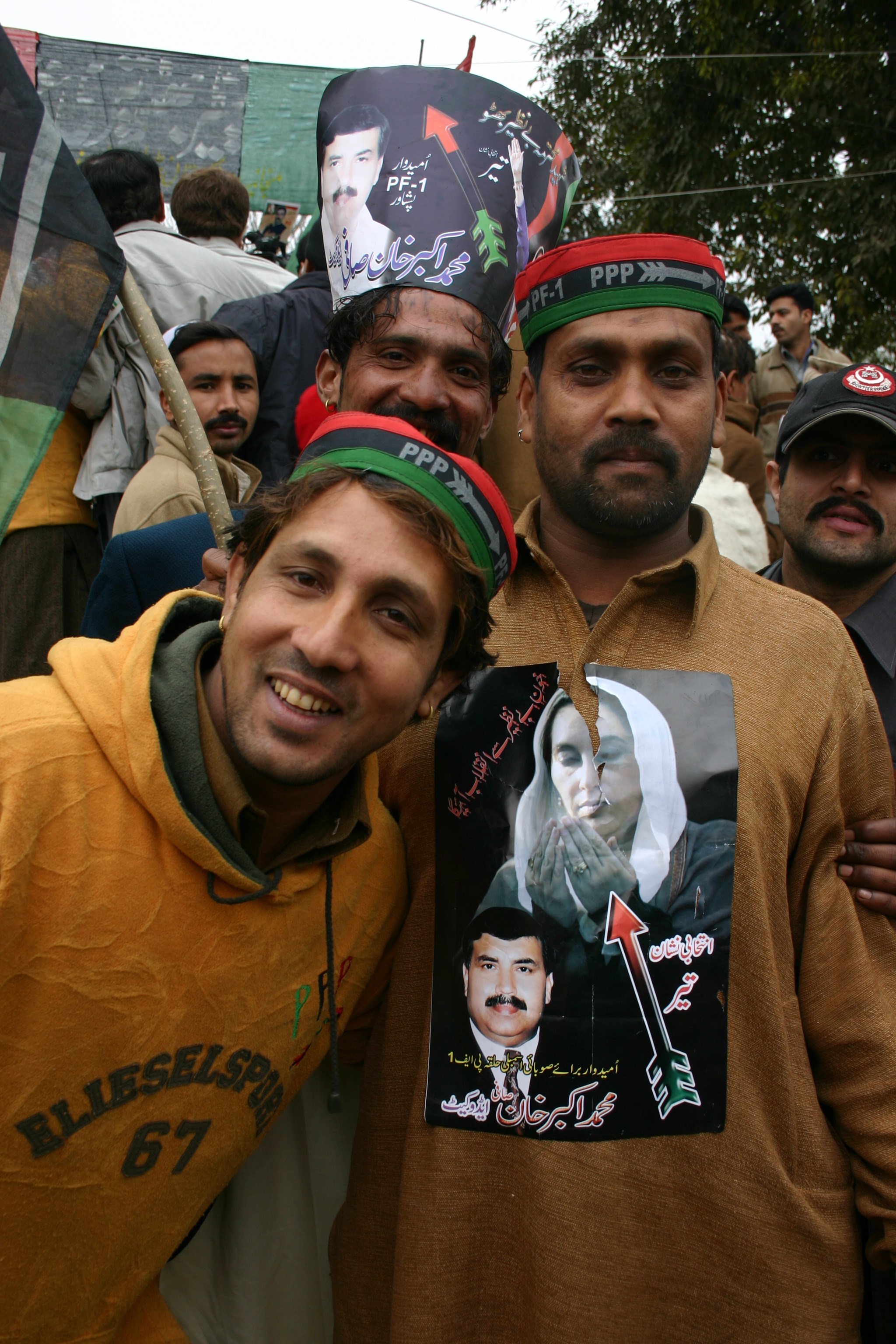 PPP Wahlveranstaltung in Peshawar